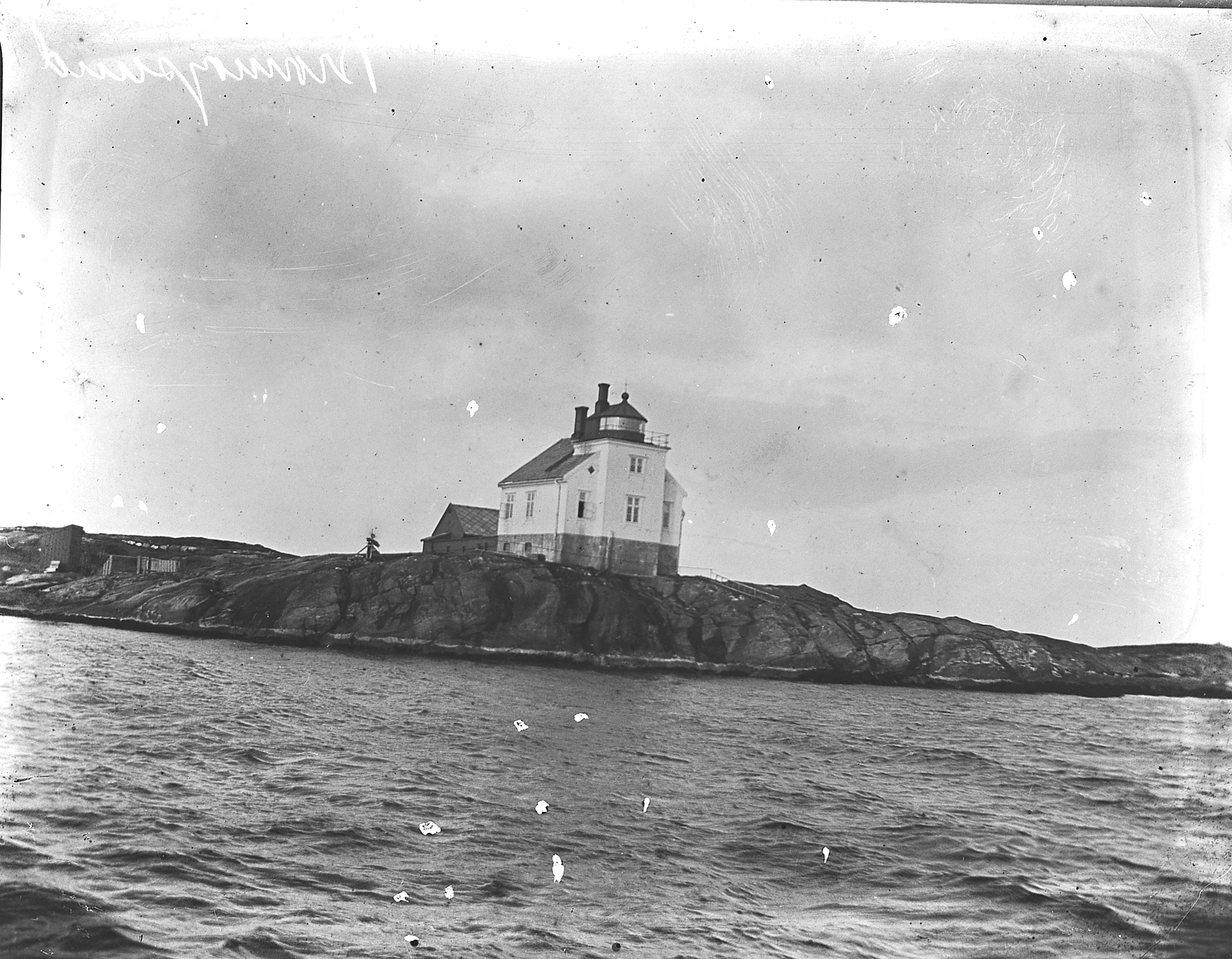 Bildet er av Prestøya fyr ved Brønnøysund. Prestøya fyr ble opprettet i 1896. I 1935 ble fyret nedlagt og erstattet av fyrlykt. Bildet er hentet fra S-1602 Fyrdirektoratet - RA/S-1602/1/U/L0003/0037 Korrespondansen er hentet fra Fyrdirektoratet - RA/S-1602/2/D/L0060 The photo is of Prestøya lighthouse in Brønnøysund. Prestøya lighthouse was erected in 1896. In 1935 it was shut down and replaced by a non-attendant lighthouse.